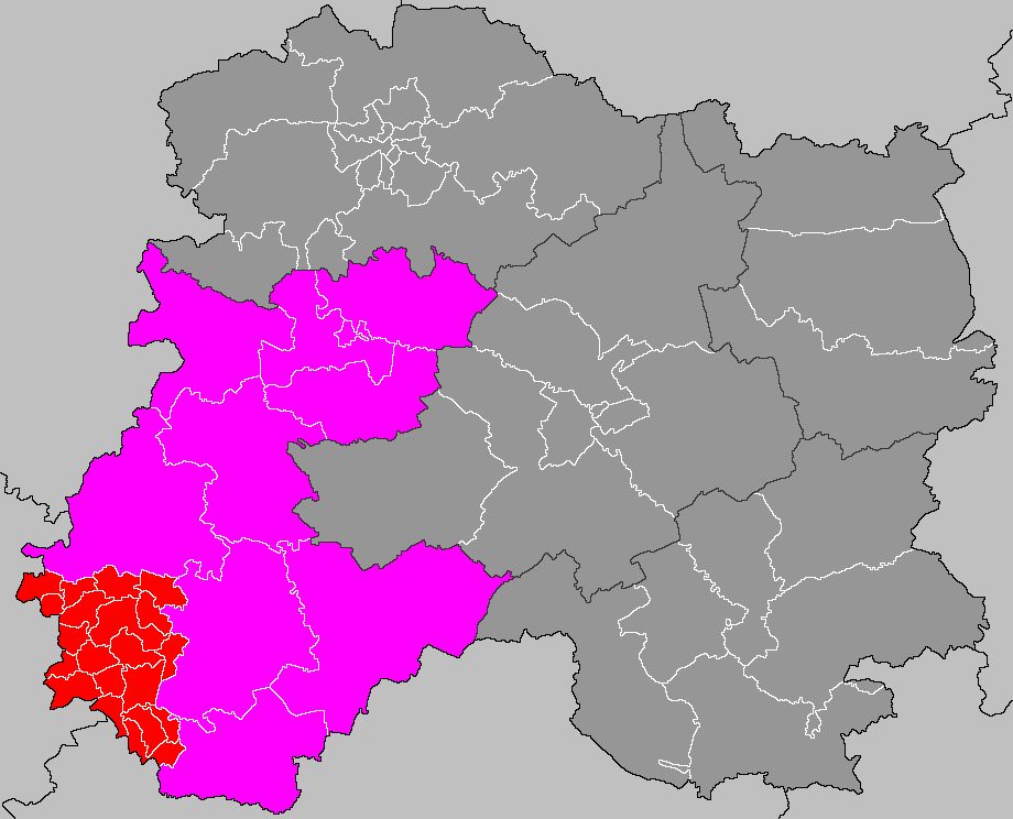 Localisation du canton d'Esternay